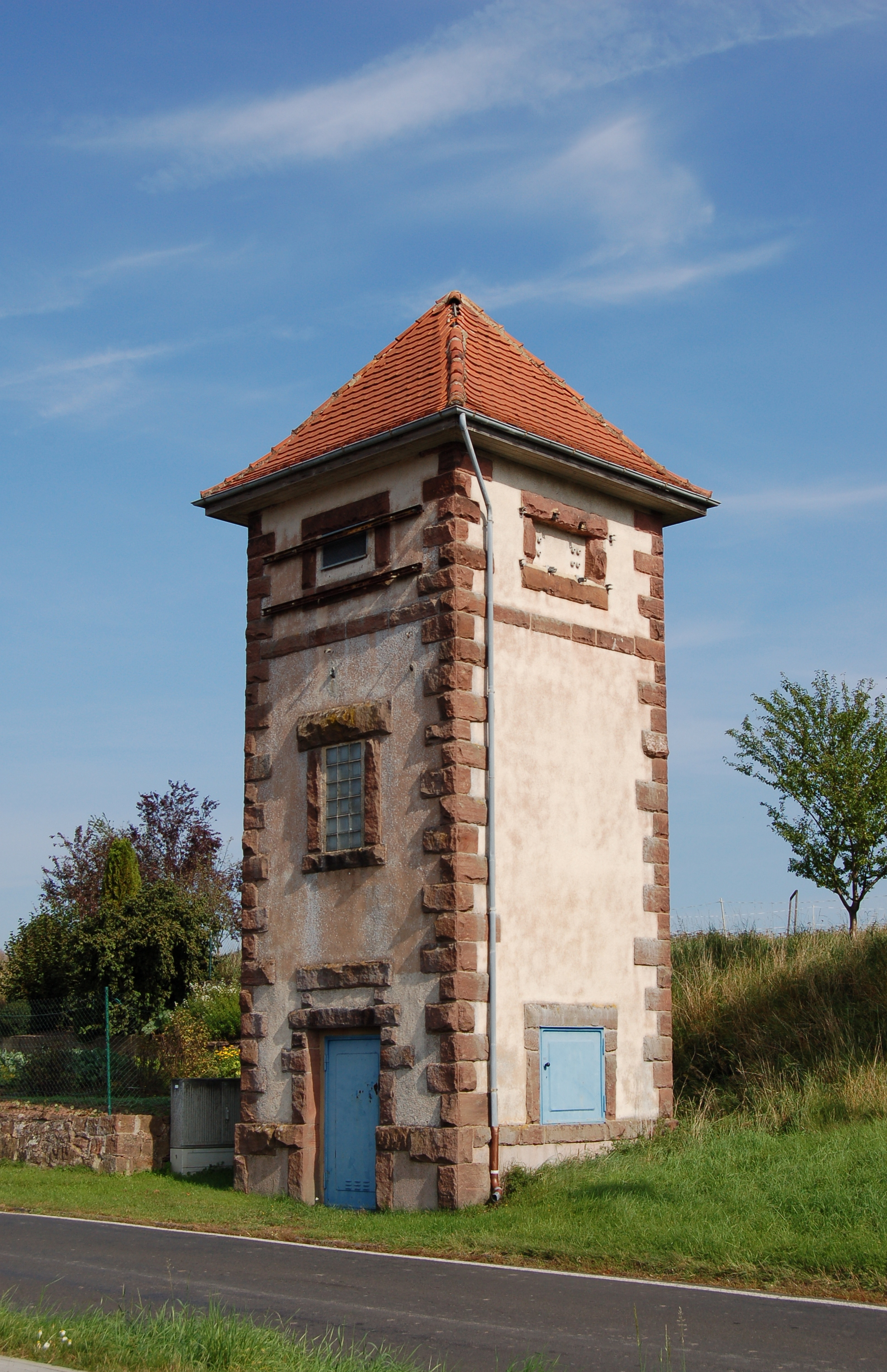 Dieses Foto entstand im Rahmen des Projekts Wiki Loves Monuments Mittelhessen, das aus dem Community-Projektbudget von Wikimedia Deutschland e. V. gefördert wurde.